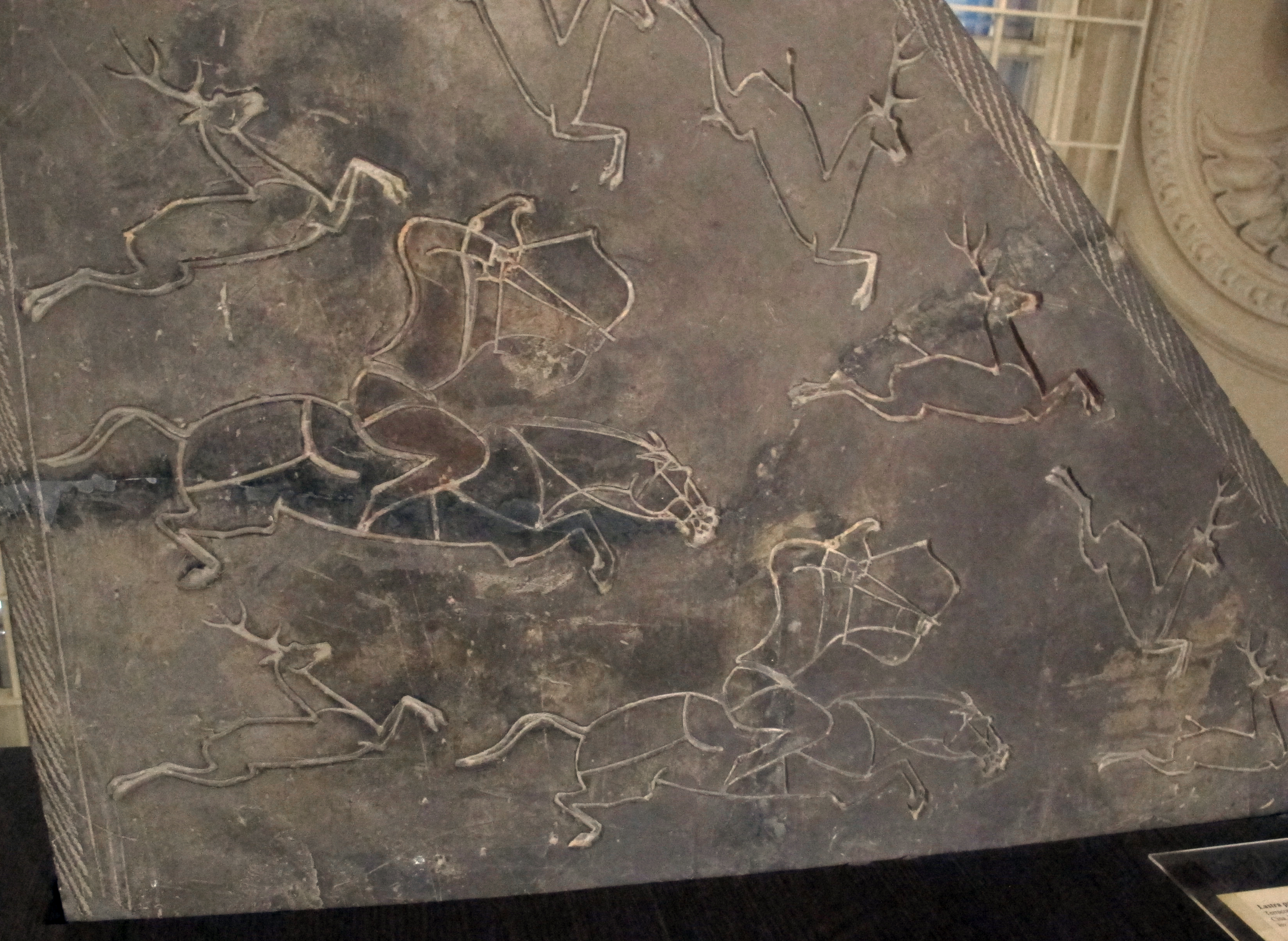 Dinastia han, lastra parietale a uso funerario con scena di caccia, 206 a.c.-220 dc. ca